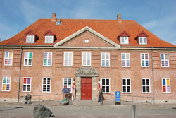 Cirkusmuseet ligger i den smukke gamle kommandantbygning i Avedørelejren i Hvidovre